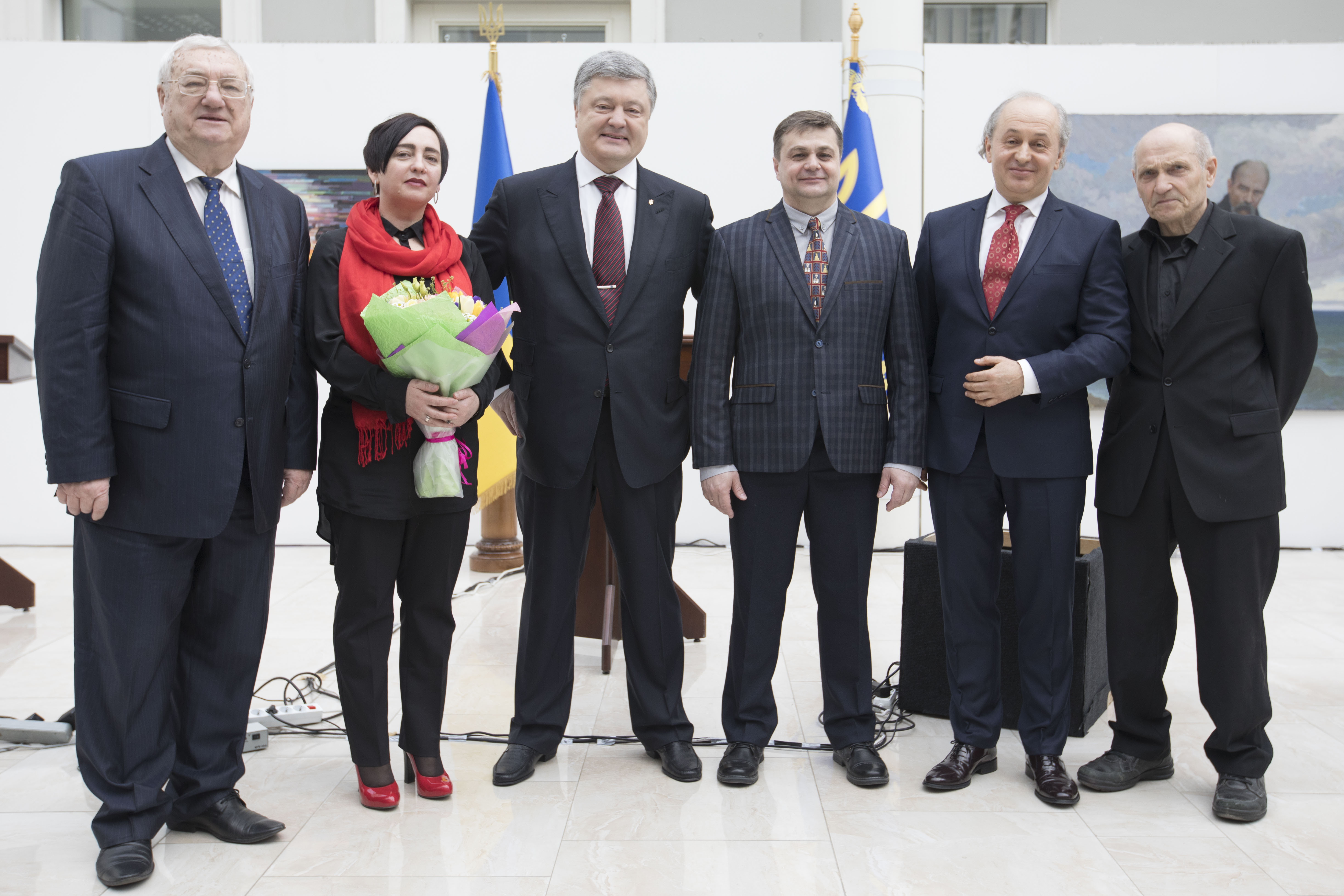 Лауреати Національної премії України імені Тараса Шевченка 2017 року разом з Президентом України Петром Порошенко та головою Комітету з Національної премії України імені Тараса Шевченка Юрієм Щербаком на церемонії вручення.